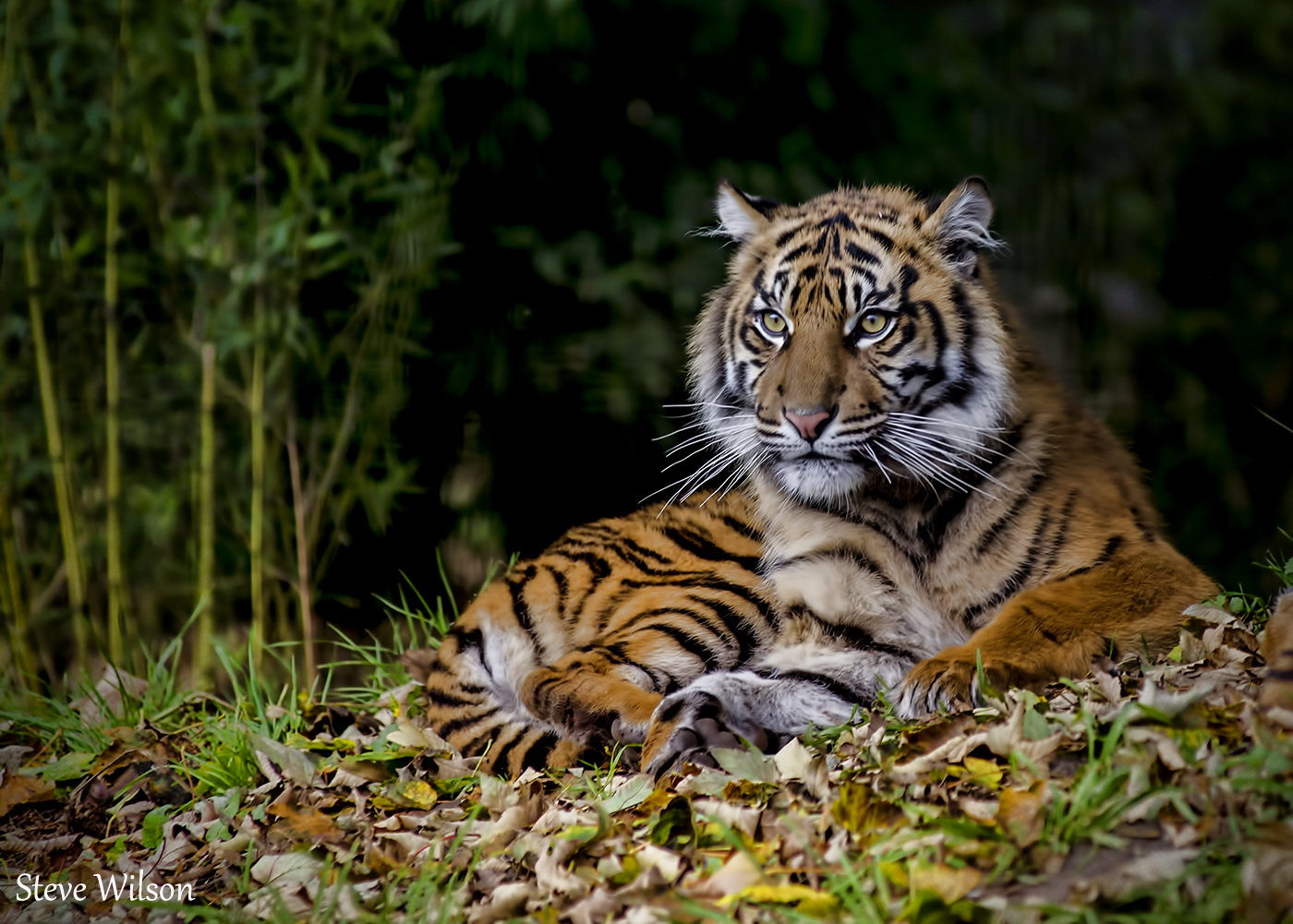 Young female Sumatran Tiger